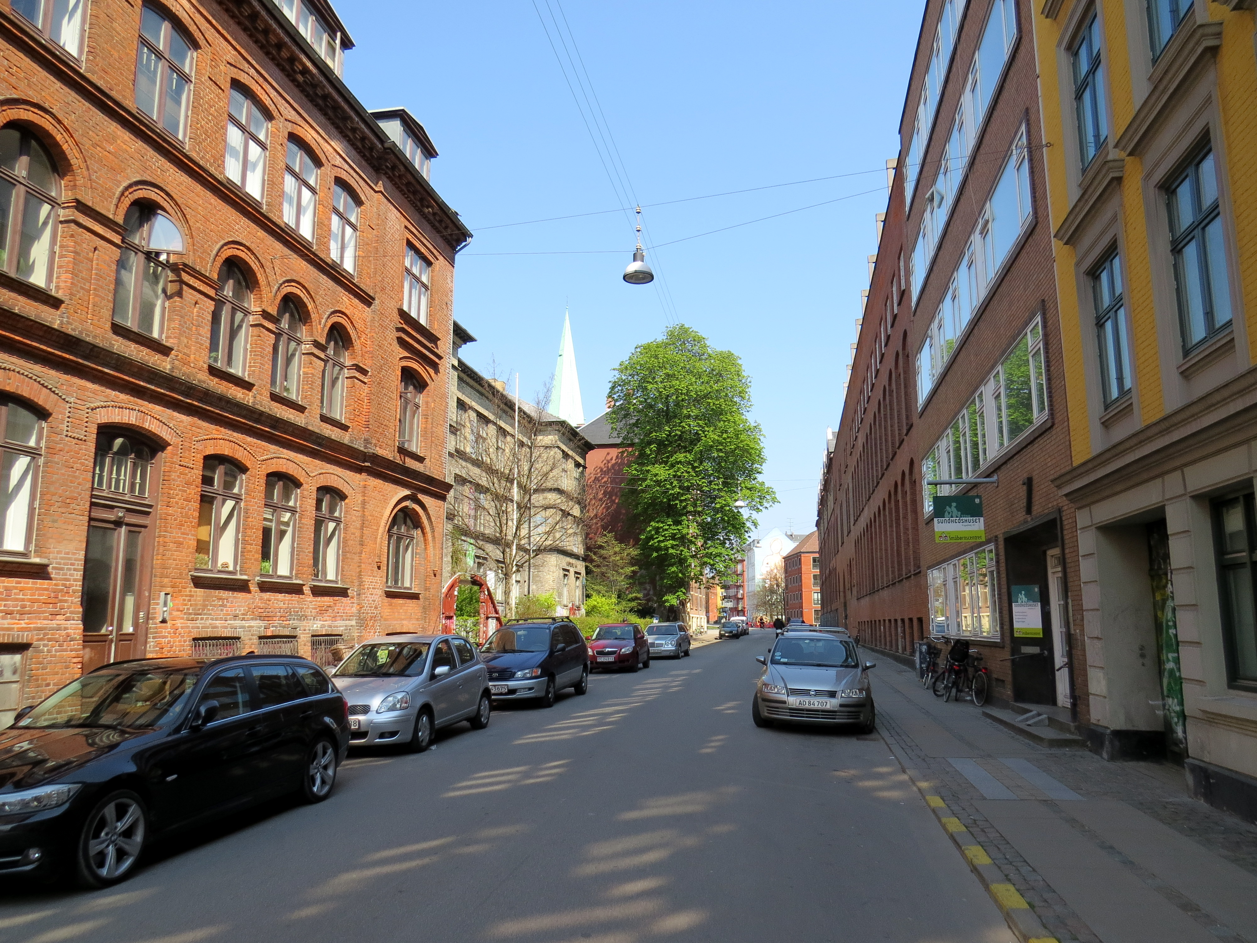 Kapelvej, Nørrebro, København